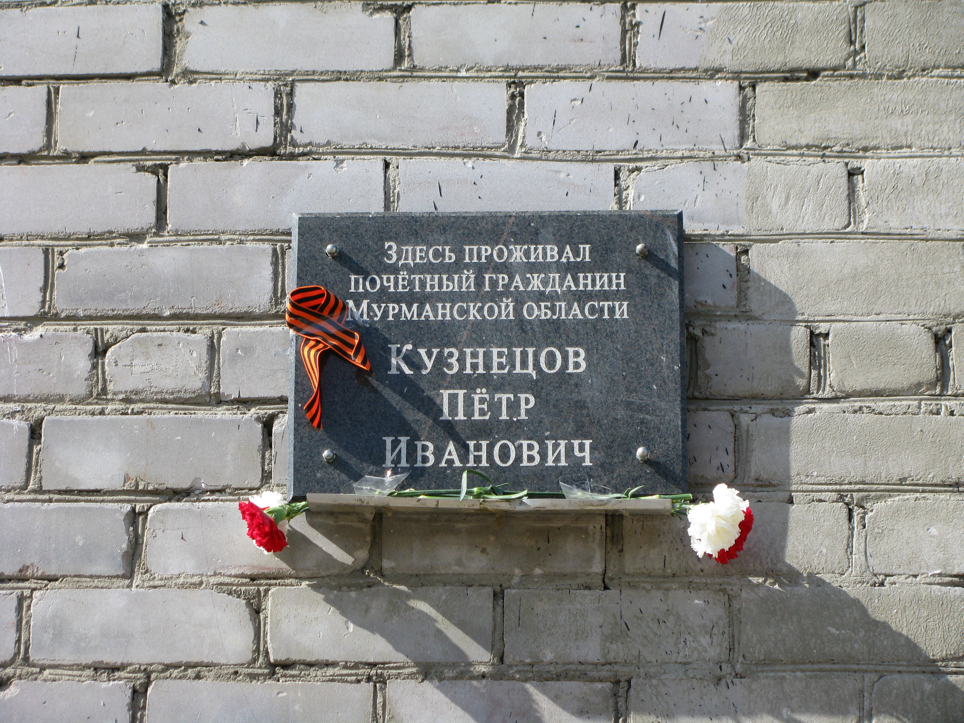 Мемориальная доска Кузнецову П. И., Мурманская обл. с. Тулома, ул. Школьная, д. 1